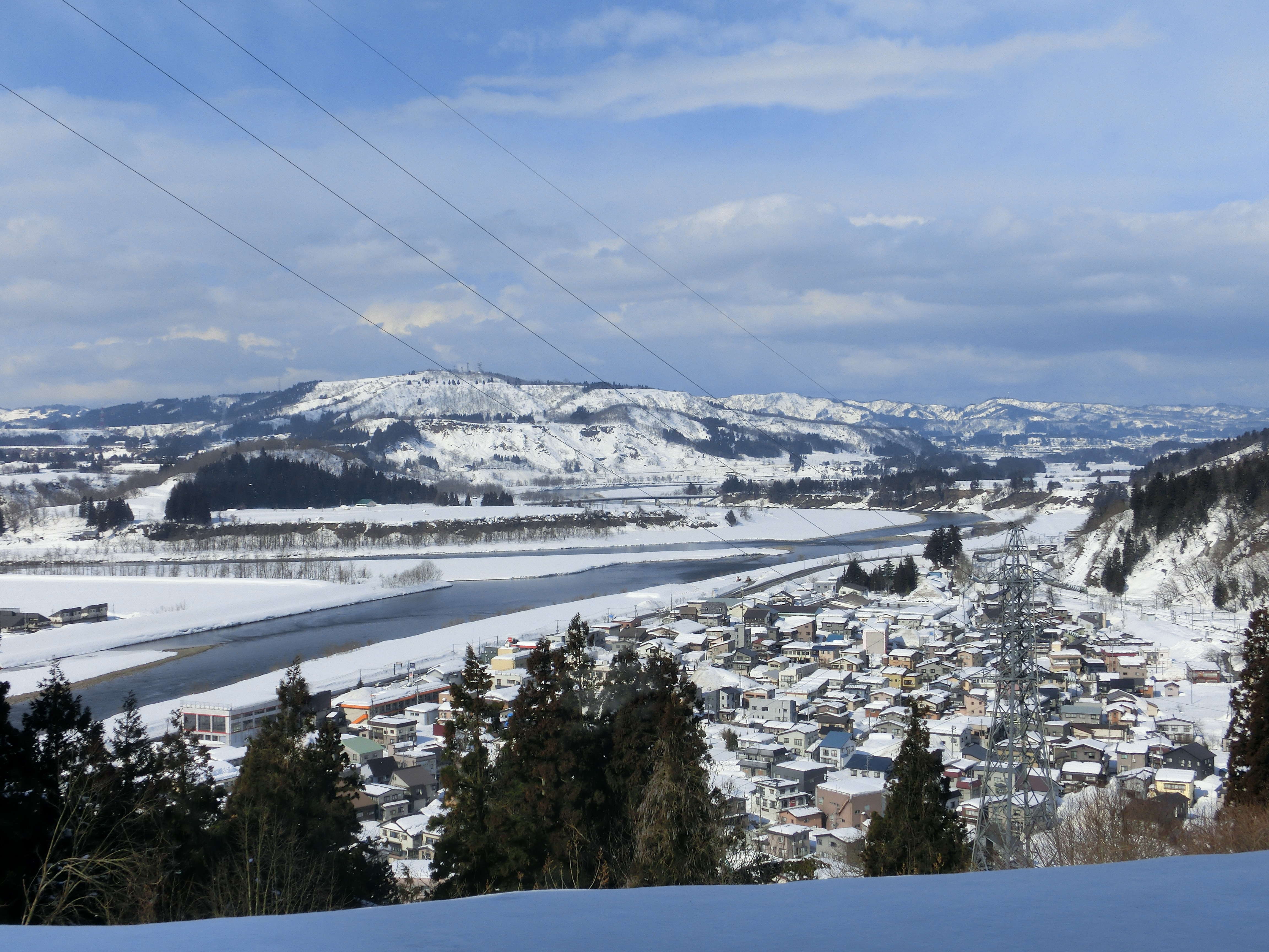 この画像は2018年2月23日新潟県長岡市川口中山2515-3えちご川口温泉にて撮影された東川口市街と、その西岸を流れる魚野川と信濃川の合流地域の写真。信濃川下流に架かっている橋は牛ケ島大橋。信濃川対岸の山は山本山 (小千谷市)。